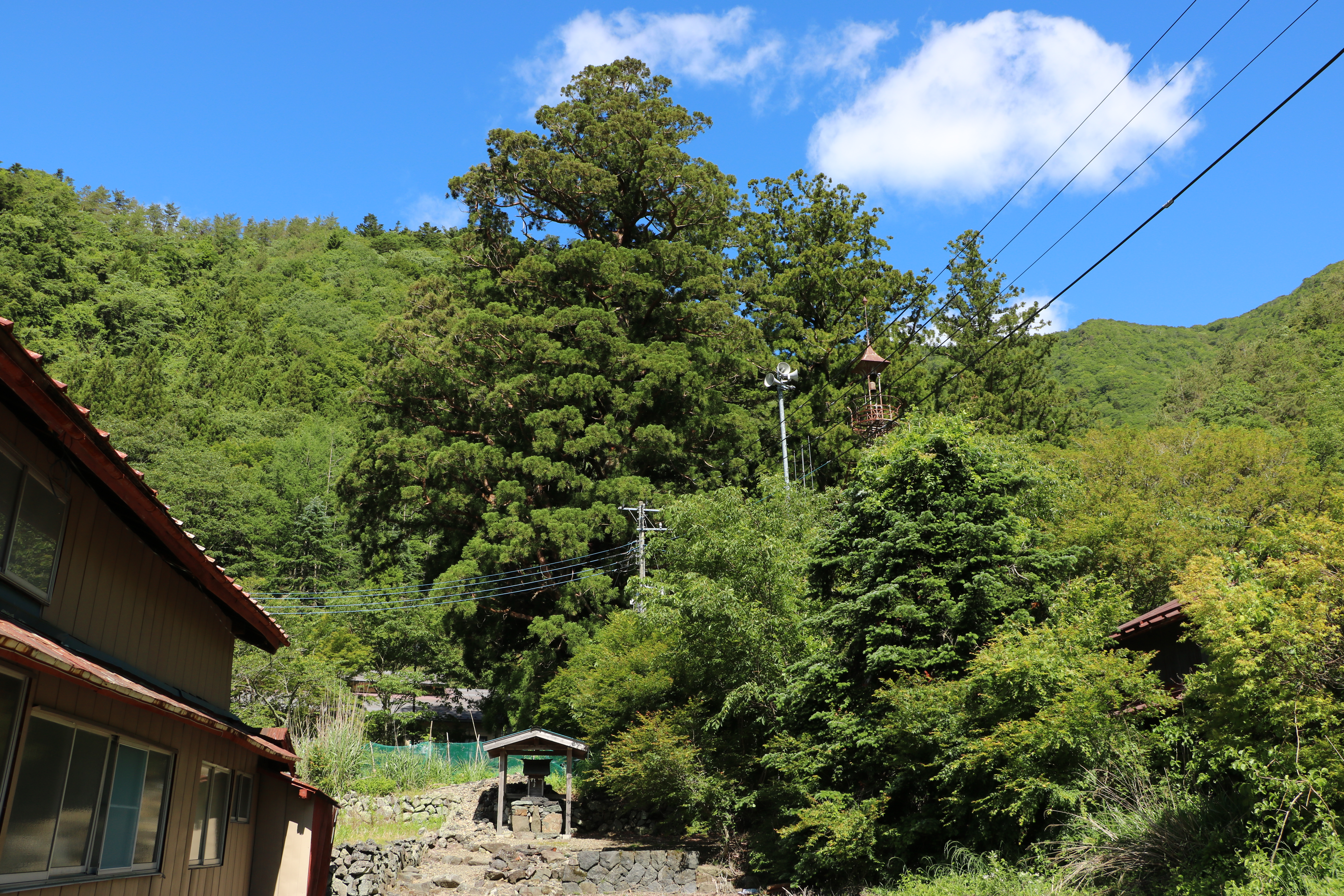 国指定天然記念物、精進の大スギ（山梨県南都留郡富士河口湖町）